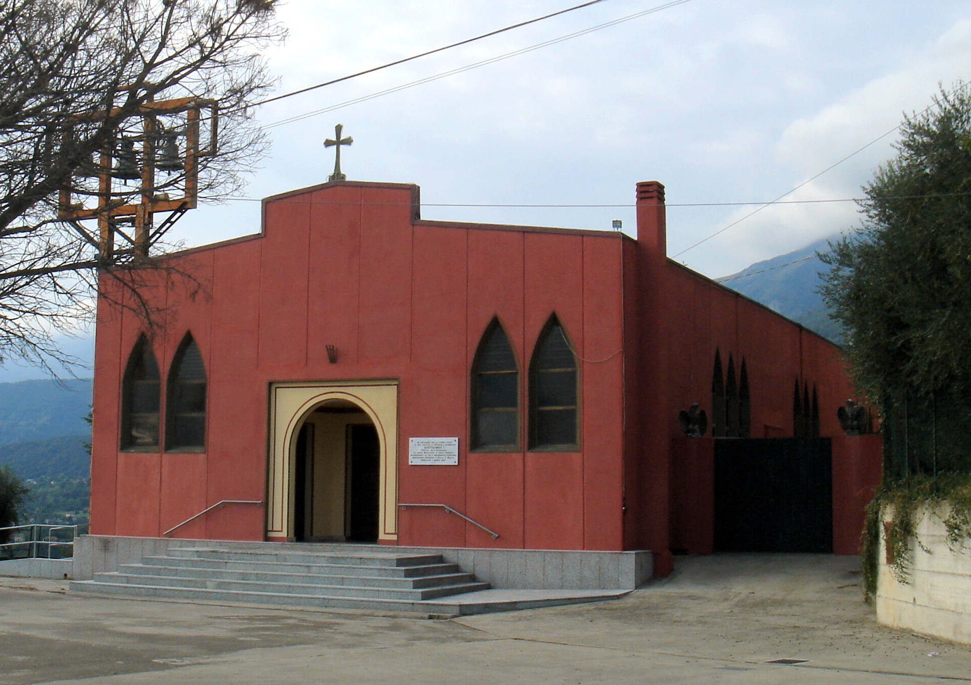 Montaner di Sarmede (Treviso): chiesa ortodossa (XX secolo).